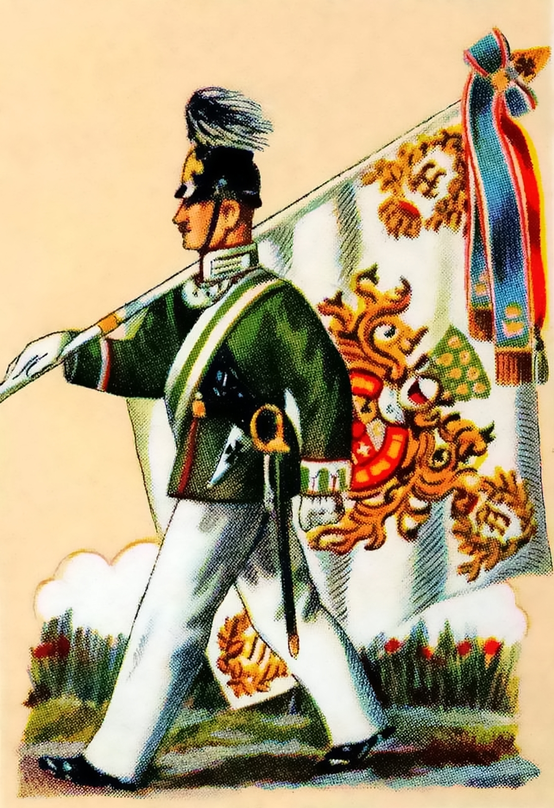 Fahne des Großherzoglich Mecklenburgischen Jäger-Bataillons Nr. 14., verliehen am 2. August 1904.